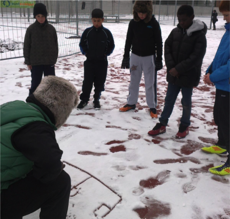 Die Trainingseinheiten durch Street Football Worker findet mindestens einmal wöchentlich statt, sowohl im Winter als auch im Sommer.